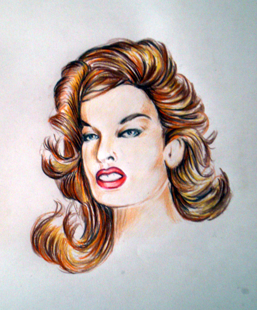 retrato